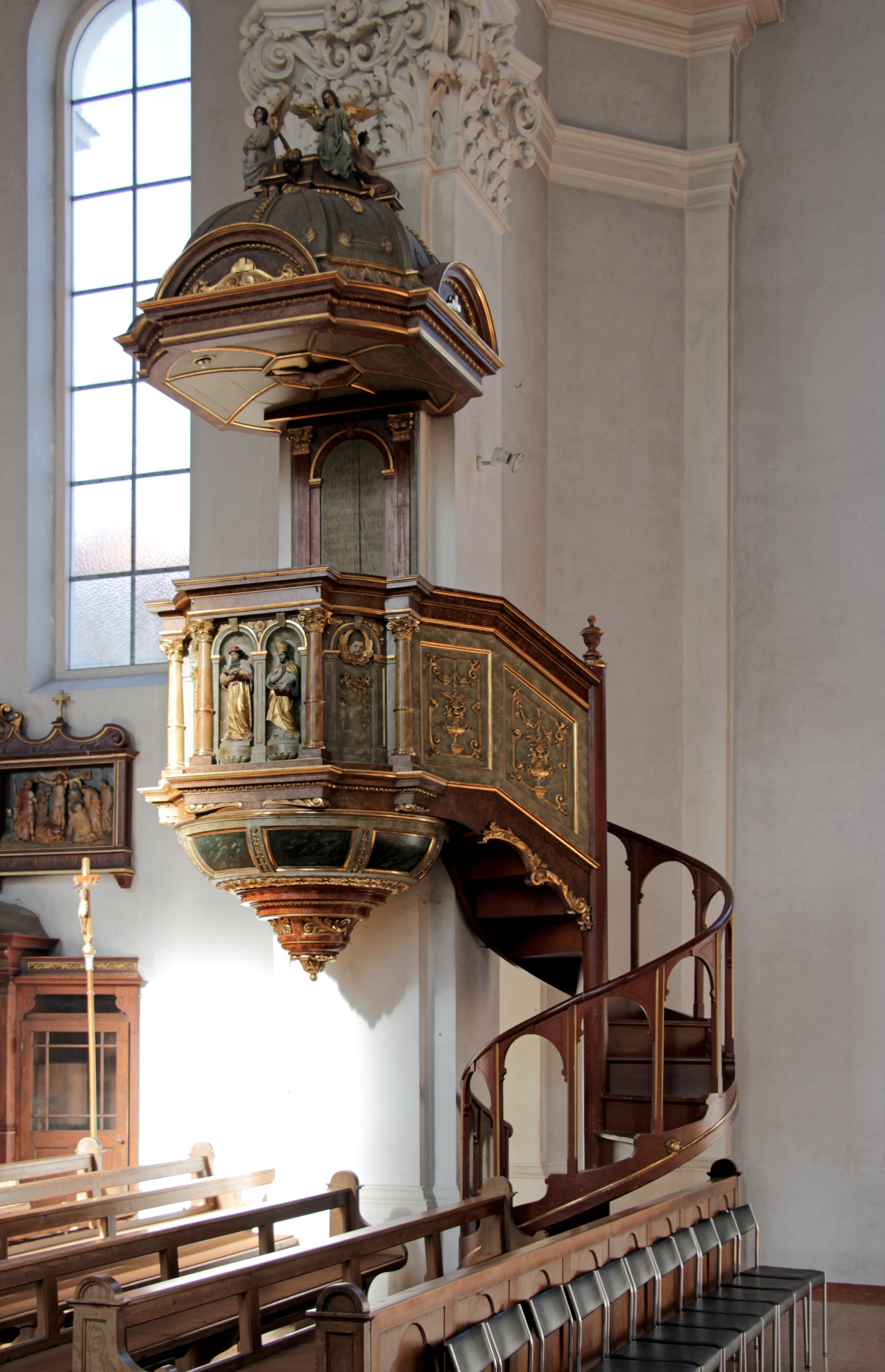 Pfarrkirche St. Nikolaus, Oberndorf bei Salzburg